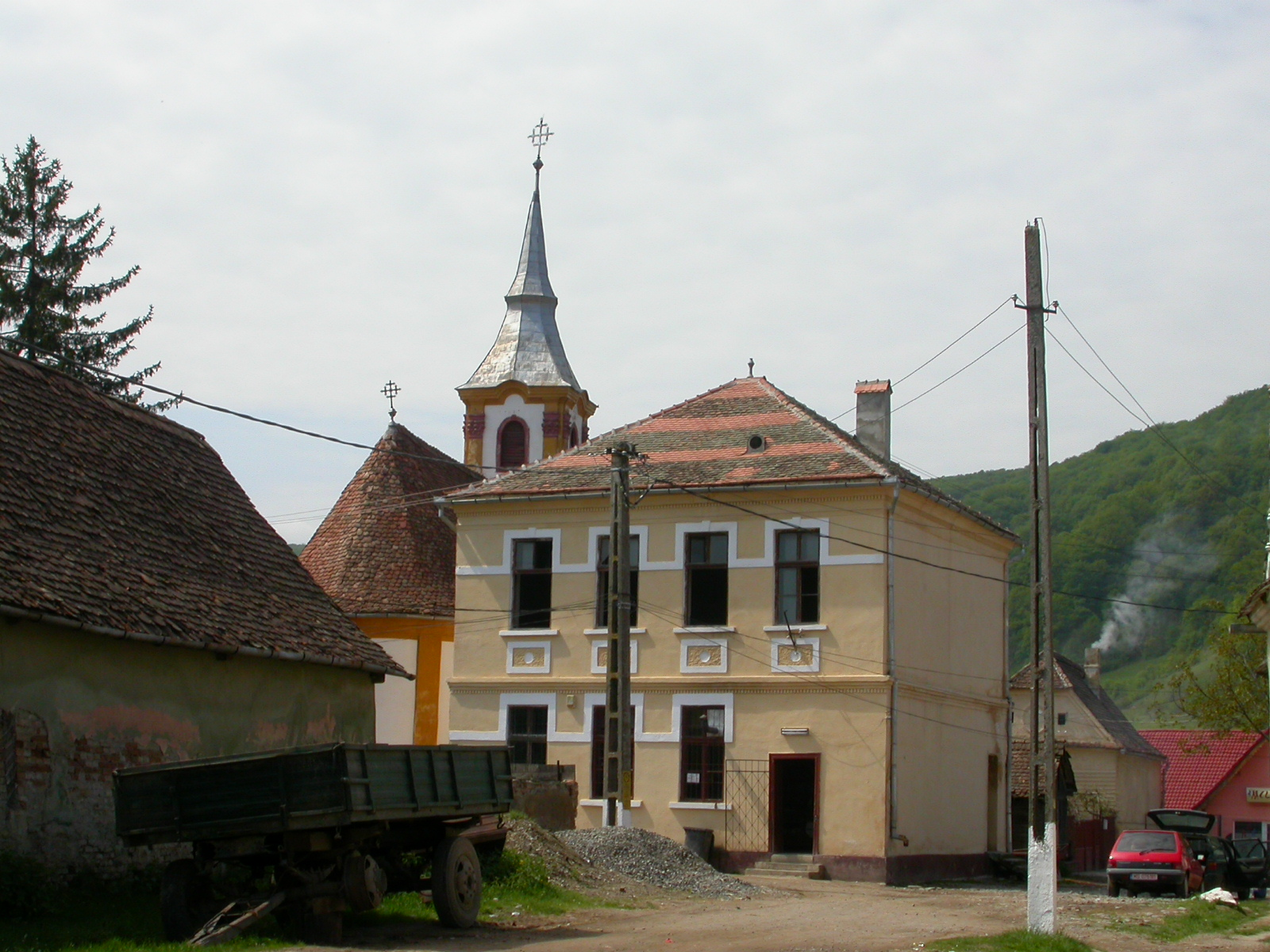 Biserica "Schimbarea la Față", 1805 - 1821